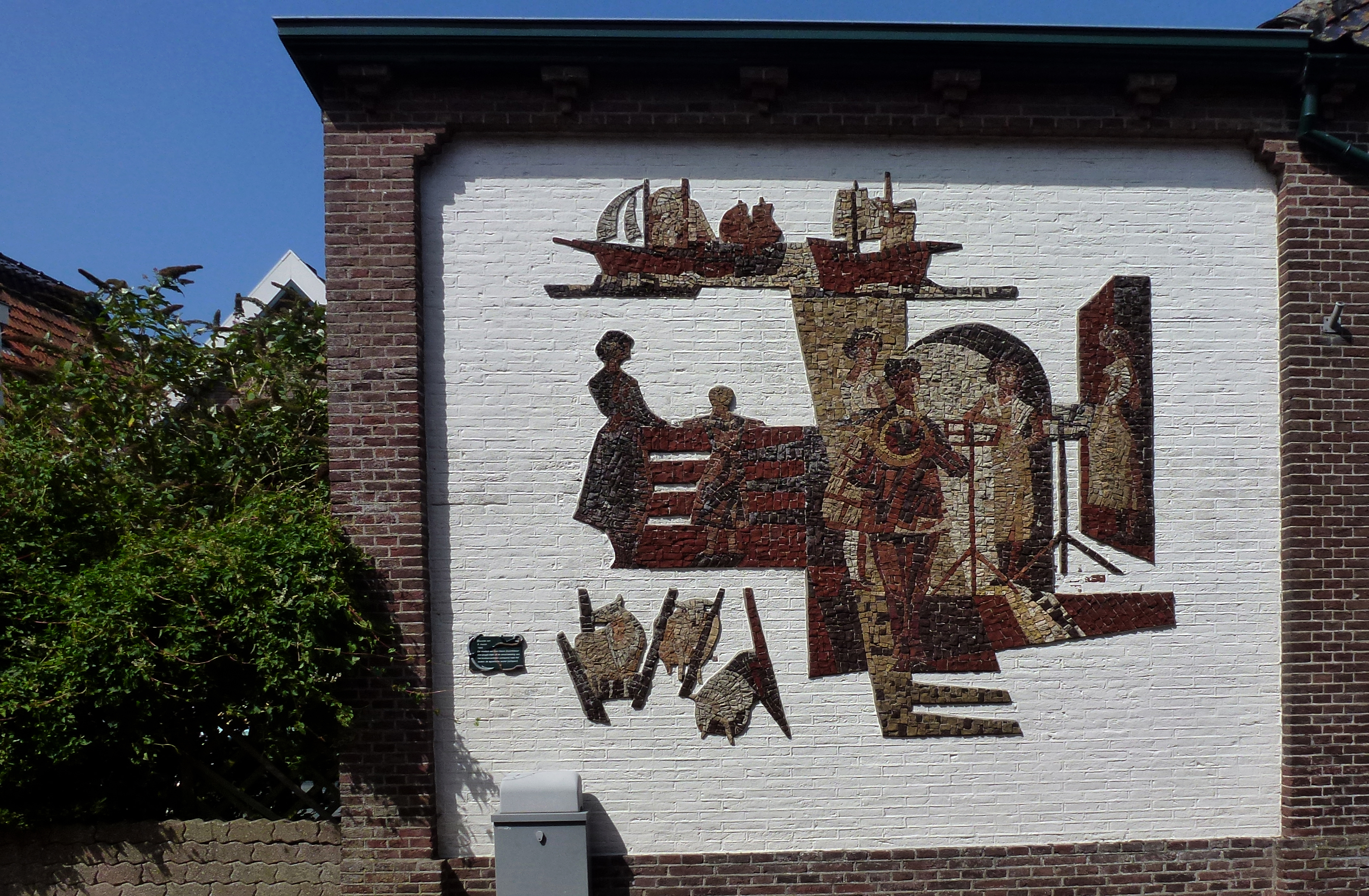 Mozaïek Hoornblazer uit 1960 van René Karrer. Dorpshuis De Waldhoorn, Herenstraat 30, Den Hoorn, Texel